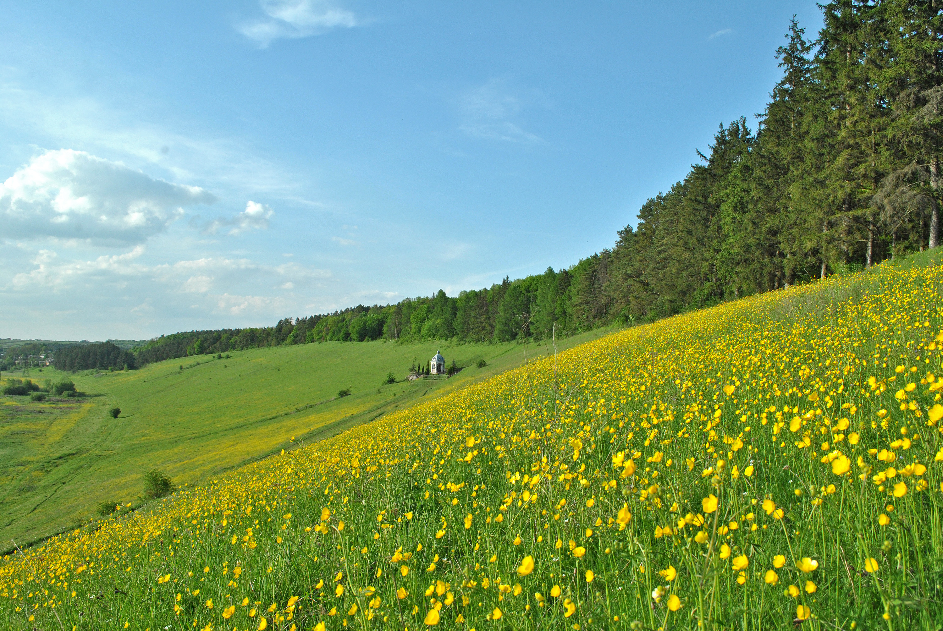 Краєвиди поблизу с. Лучка Тернопільського району Тернопільської області.